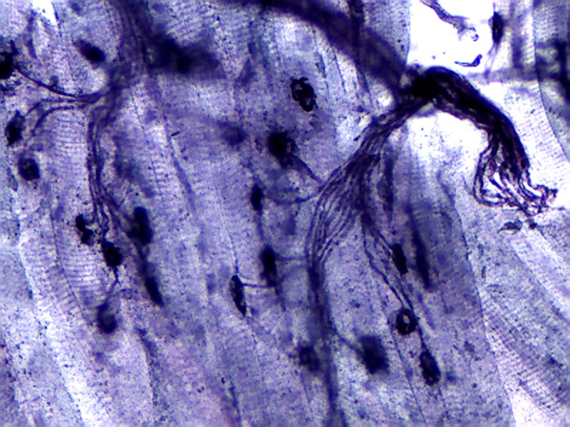 运动终板,HE染色 motor end plate